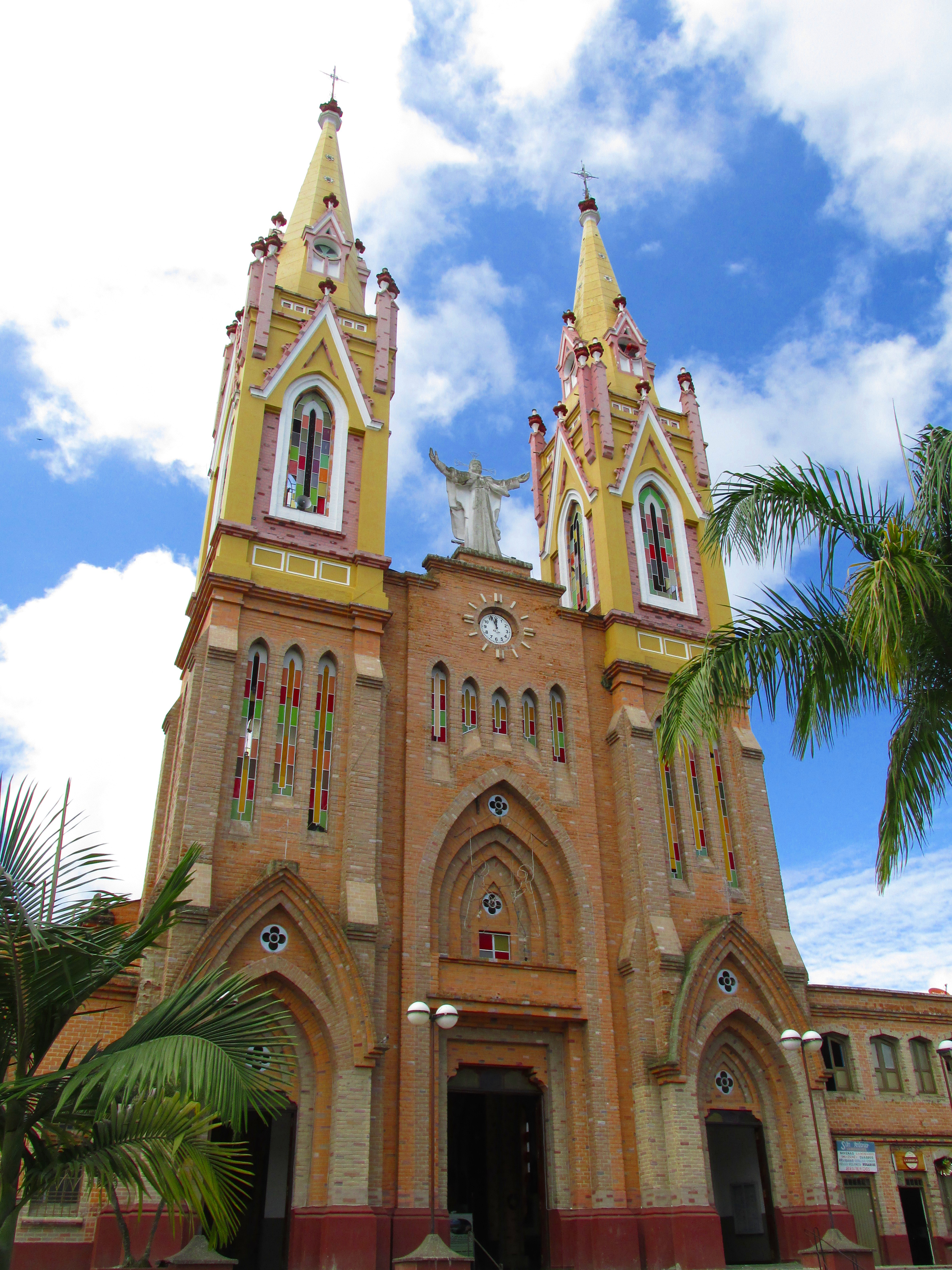 Iglesia María Inmaculada de Marsella, Risaralda